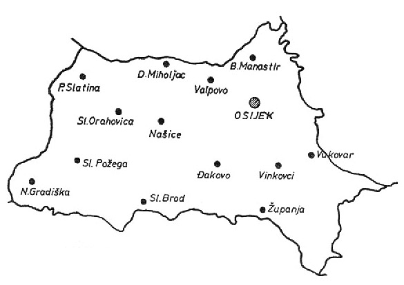 Zajednica općina Osijek